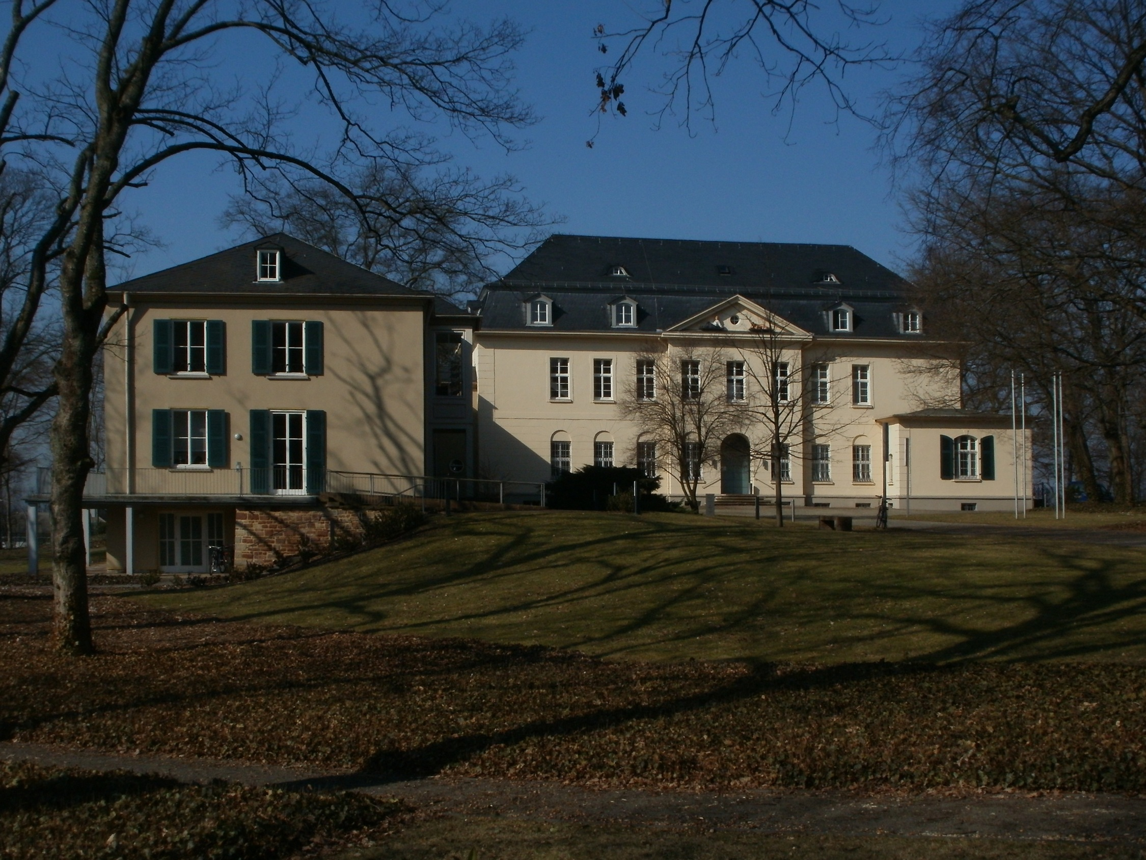 Kohlweg 7 (Saarbrücken)